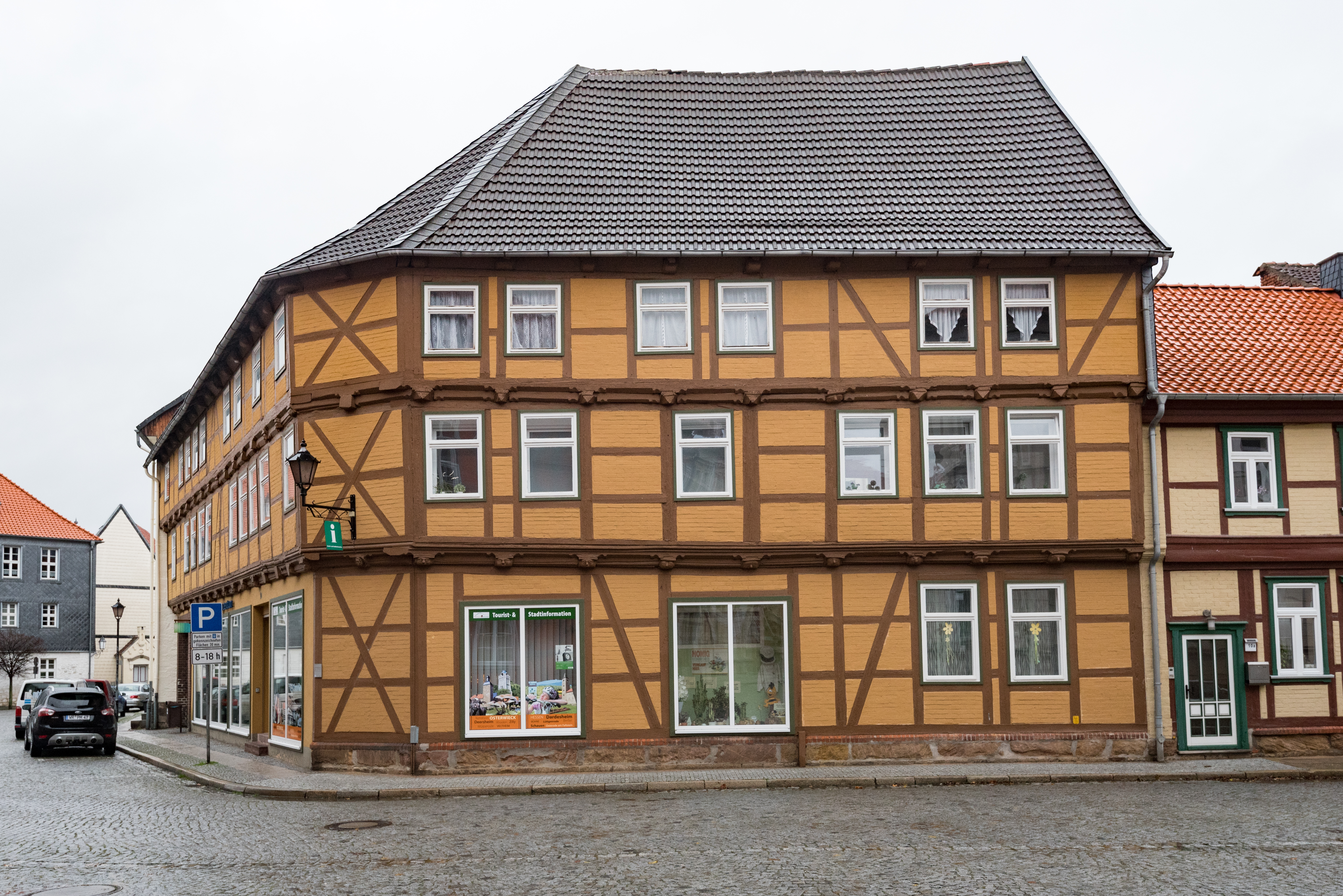 Osterwieck, Am Markt 10